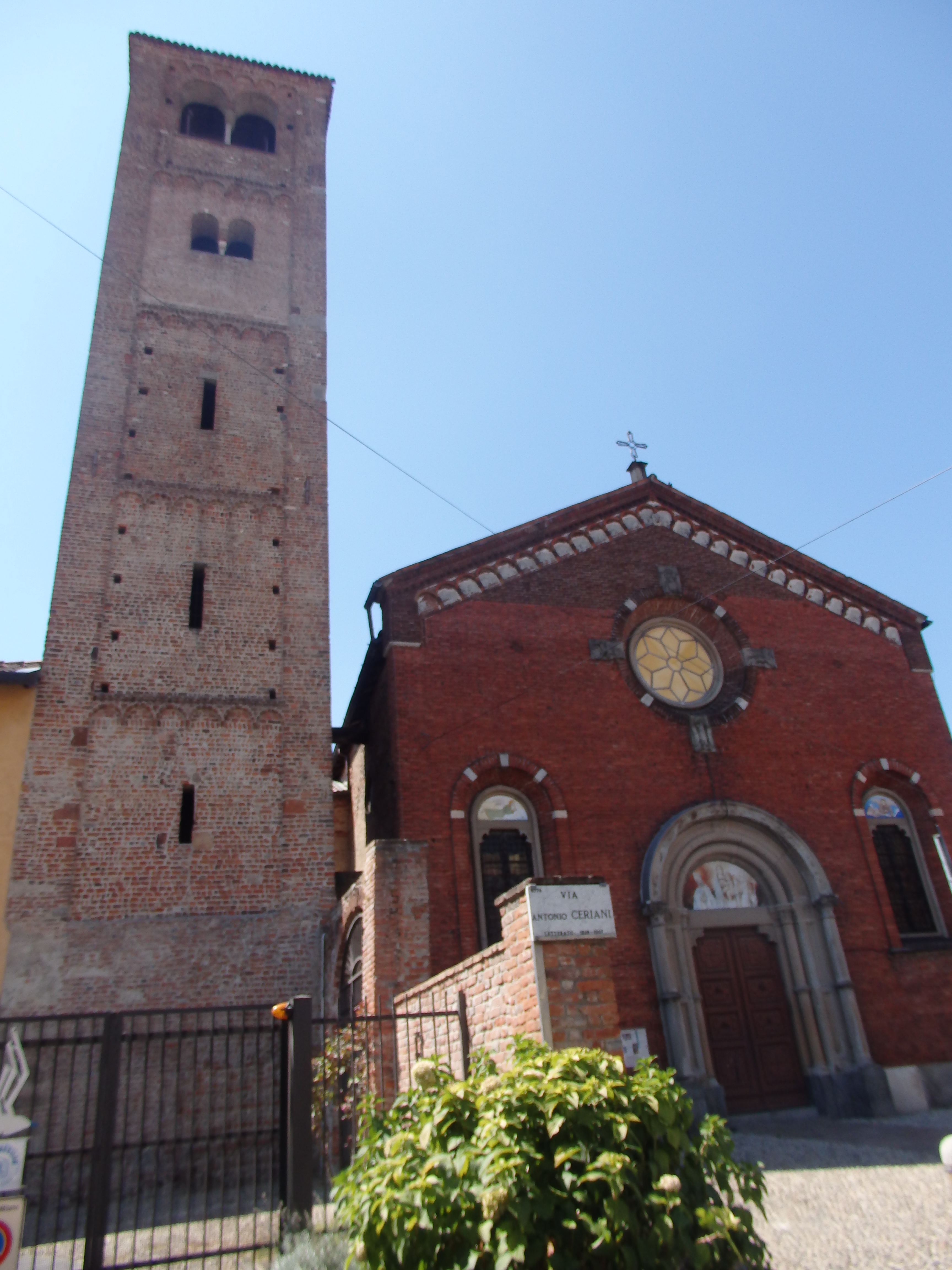 Baggio